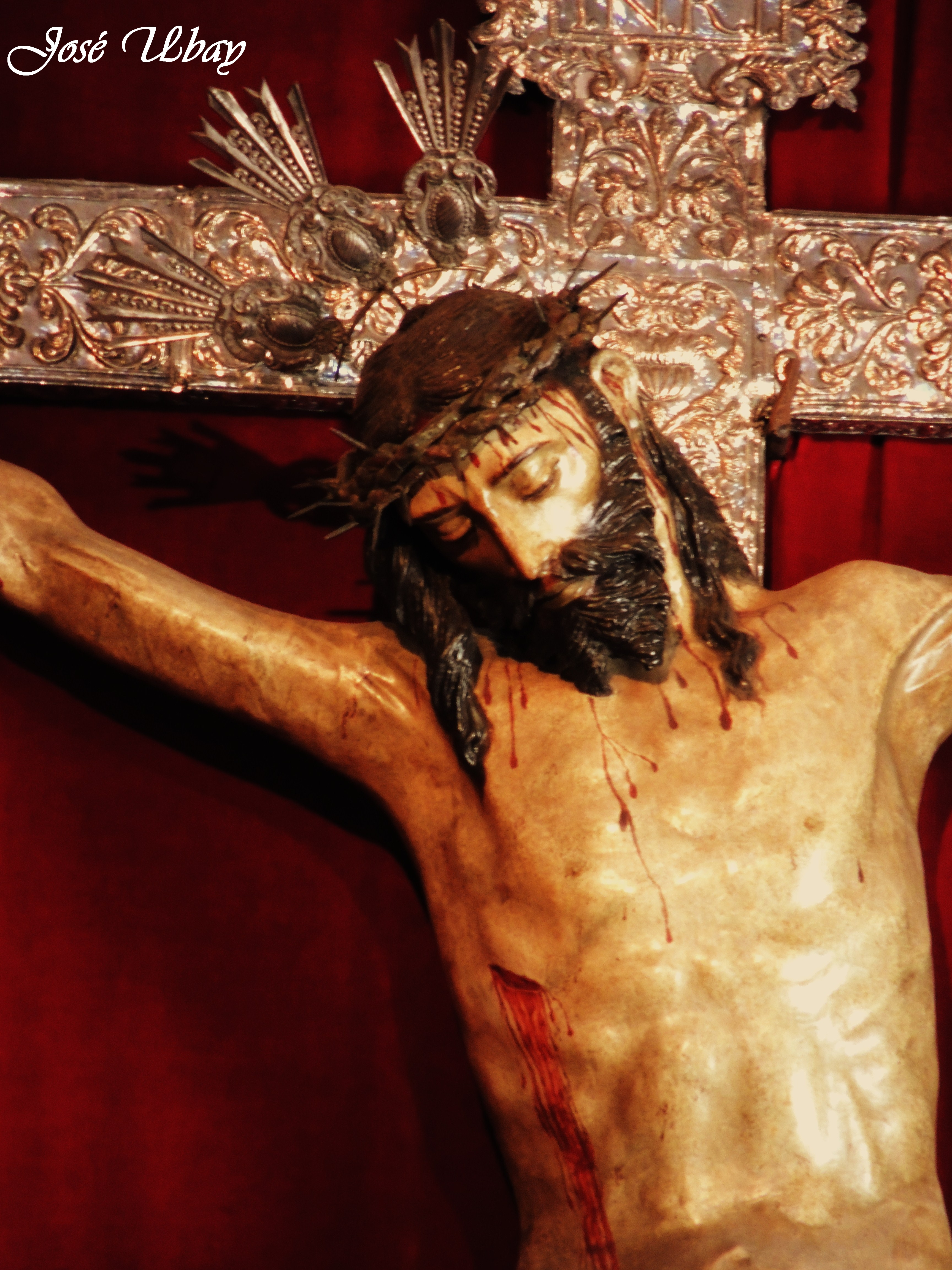 Santísimo Cristo de Telde. Siglo XVI. Matías de la Cerda. Técnica de los indios tarascos de México. Basílica de san Juan Bautista (Telde).